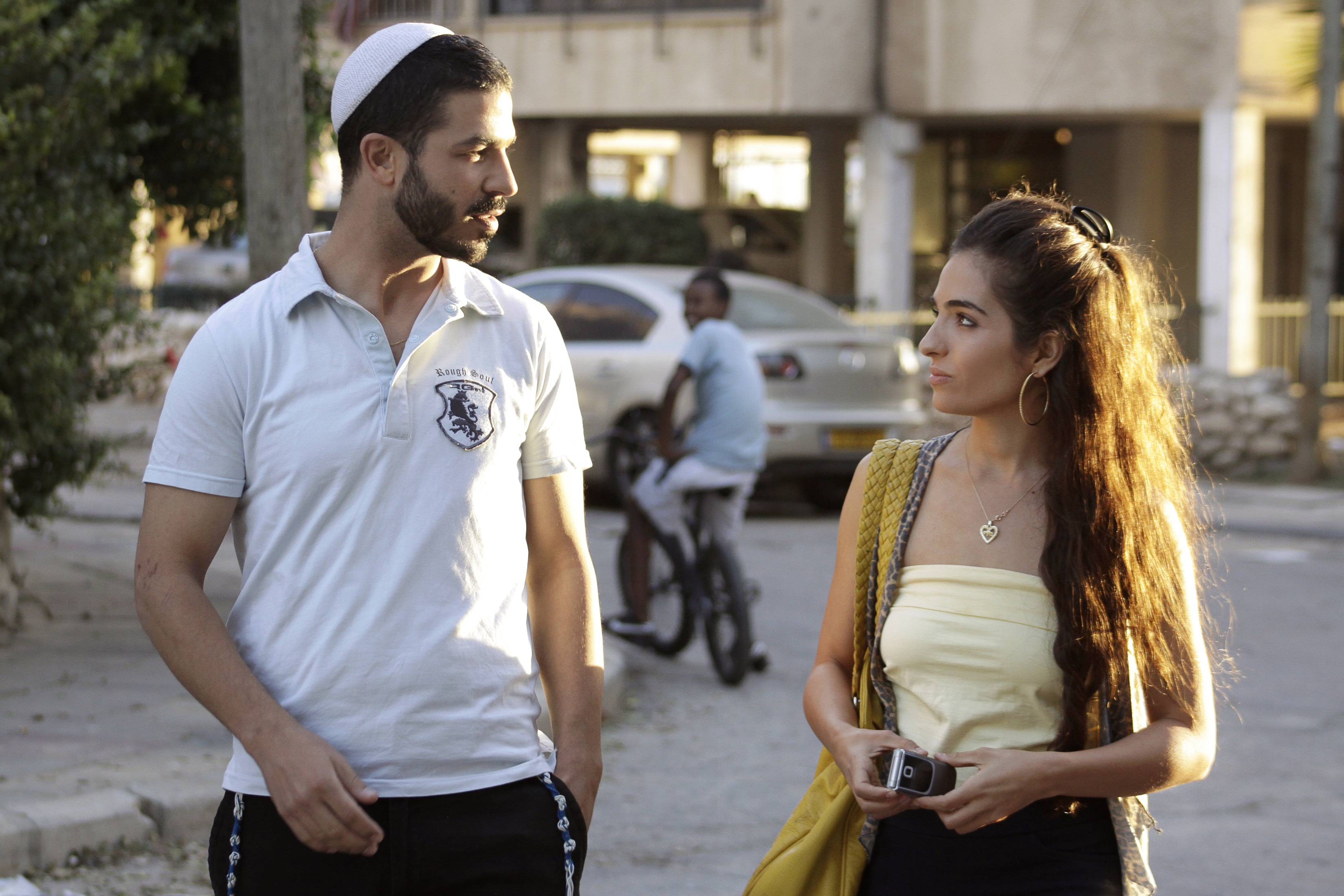 רותם זיסמן כהן ורועי אסף בסרט המשגיחים